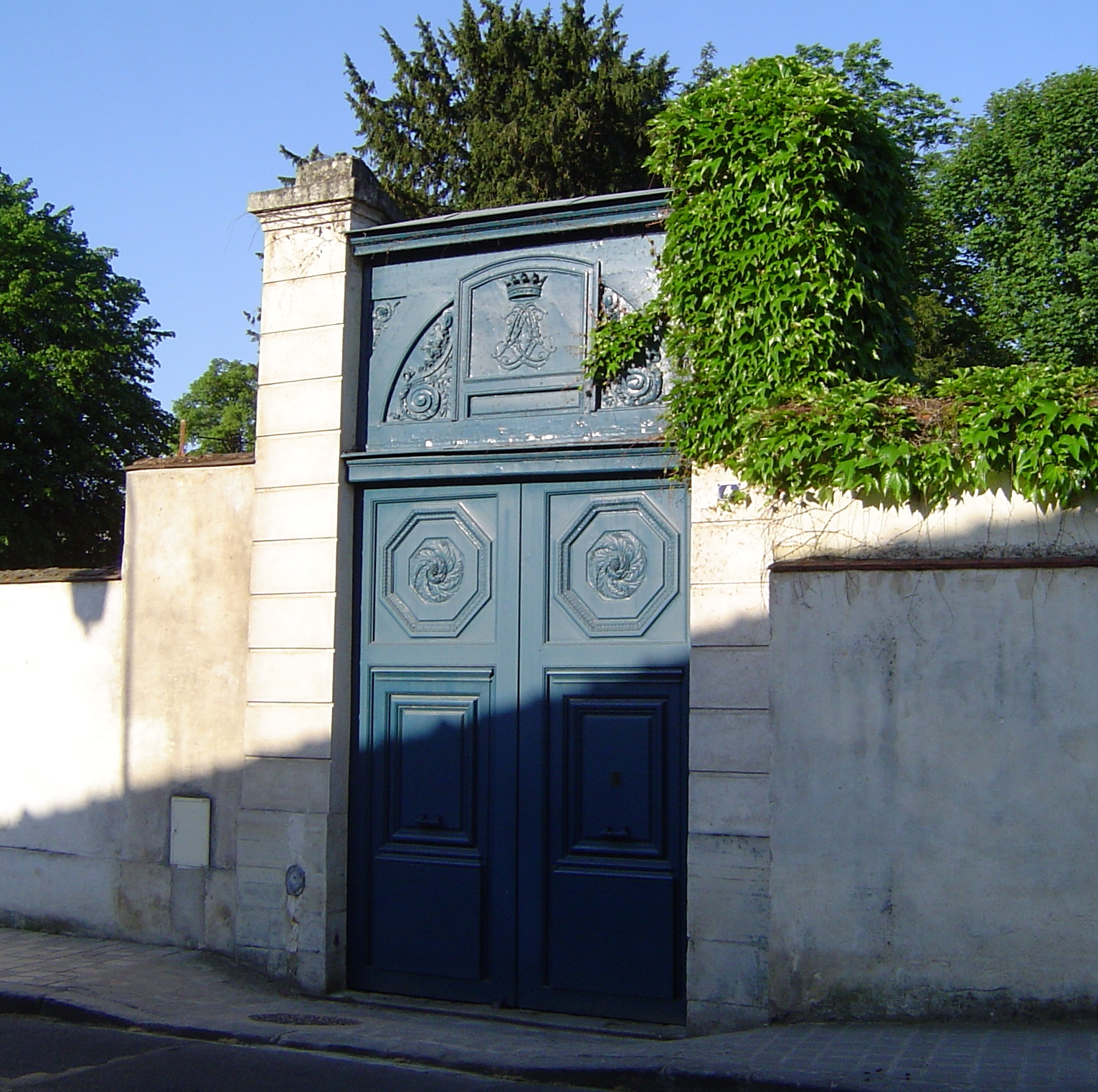 Porte du château, 4 rue Prosper-Legouté, Antony, Hauts-de-Seine, Île-de-France.